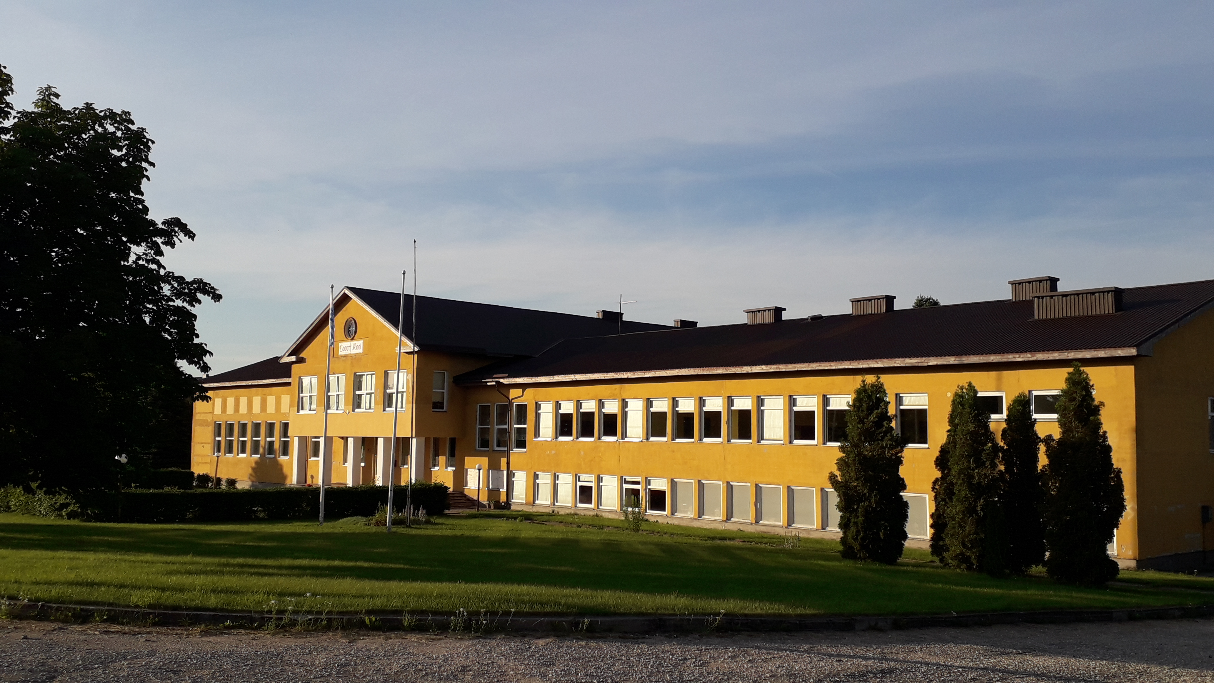 Voore põhikool